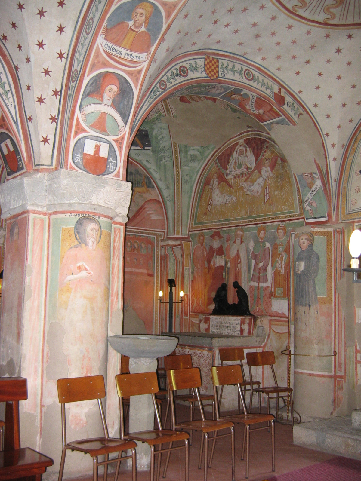 Eremo di Sant'Alberto di Butrio (Pavia), affidato agli Eremiti della Divina Provvidenza fondati da San Luigi Orione. Interno della prima chiesa.